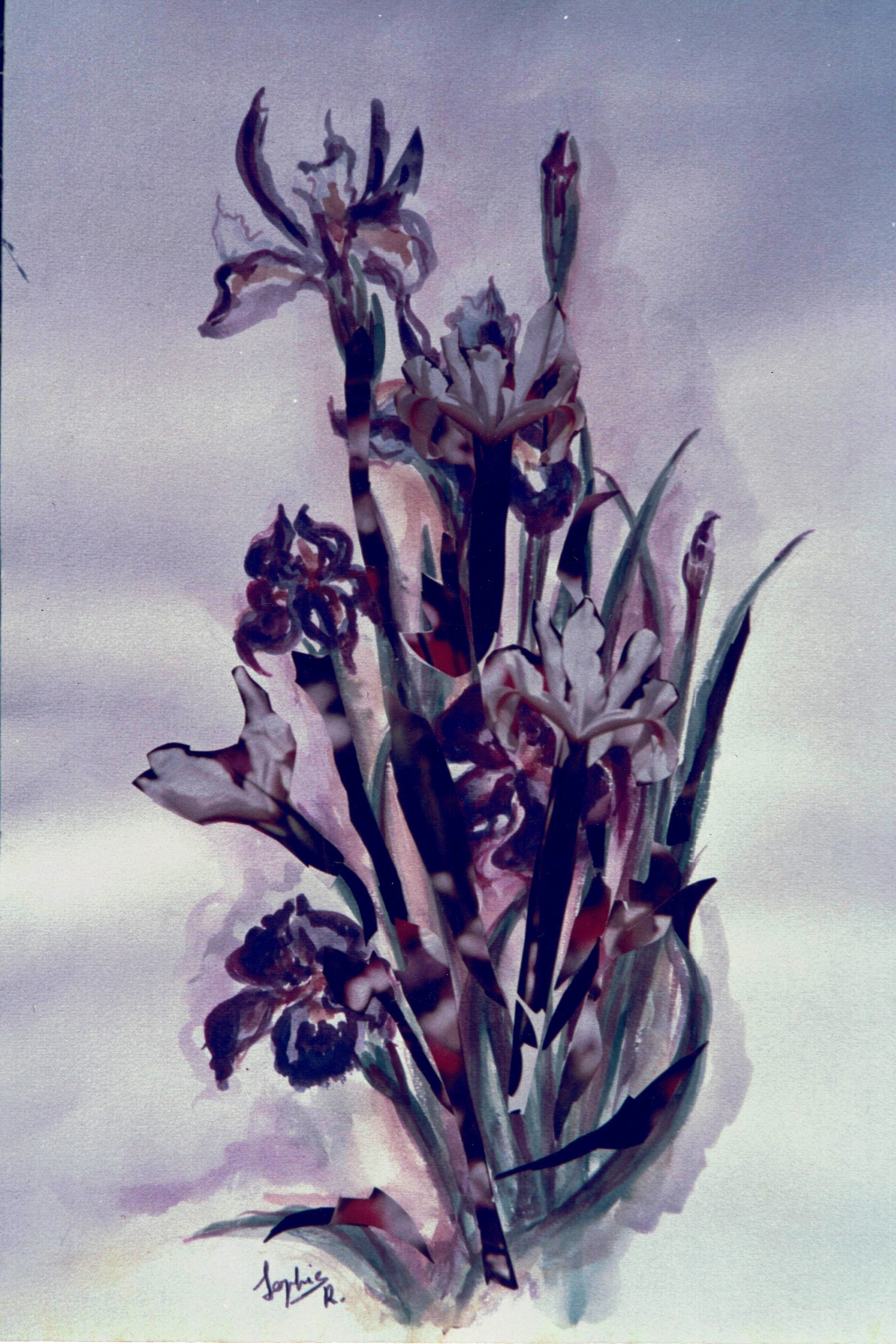 צבעי מים וניירות צבעוניים